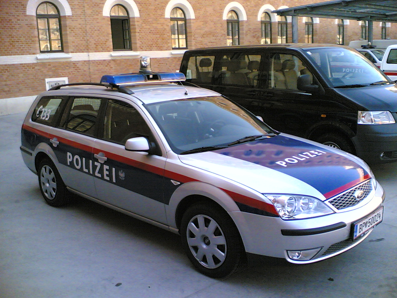 Bildbeschreibung: Streifenkraftwagen der österreichischen Bundespolizei Fotograf/Zeichner: Der Polizist 12:12, 29. Mai 2006 (CEST) Datum: 12.05.2006 Sonstiges: ...